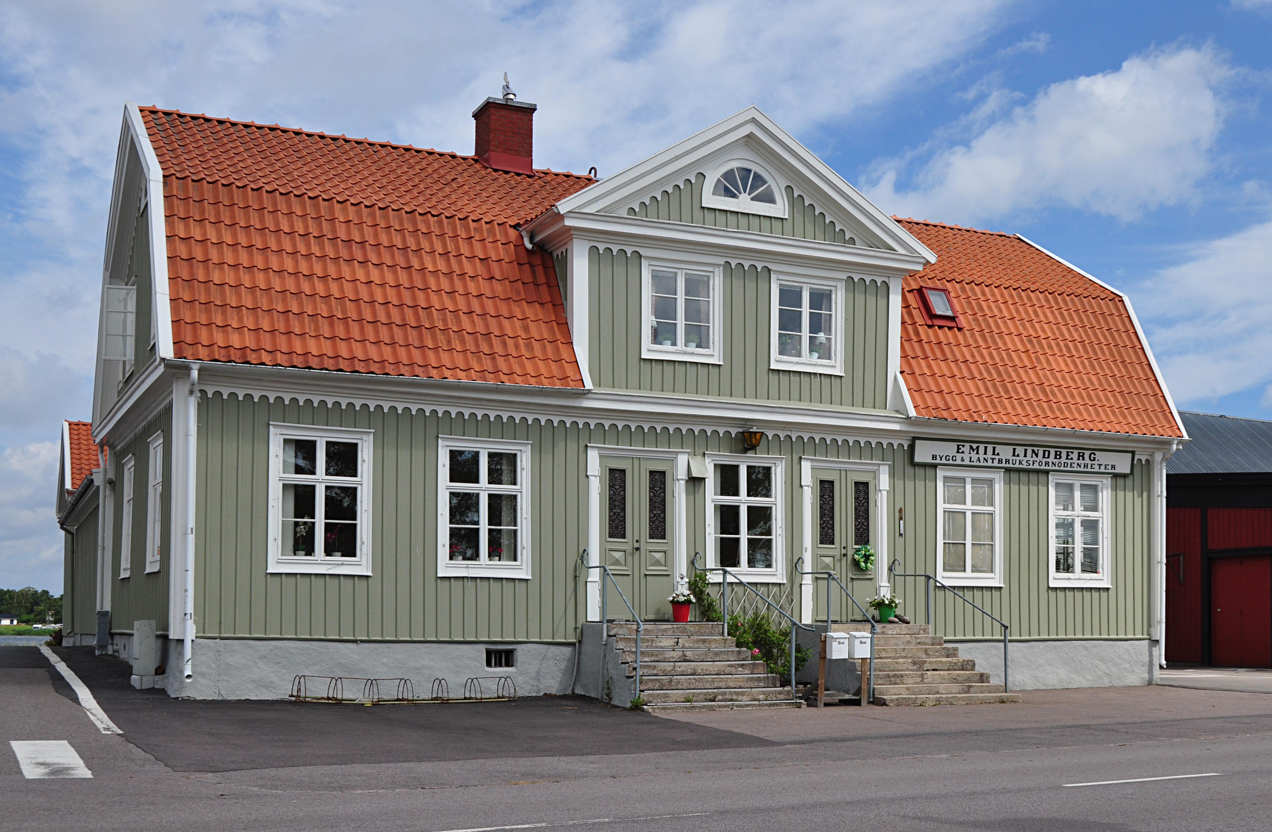 Lindbergska handelshuset uppfördes på 1830-talet i Bergkvara.